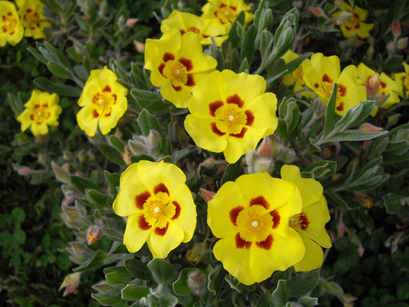 Halimiun lasianthum